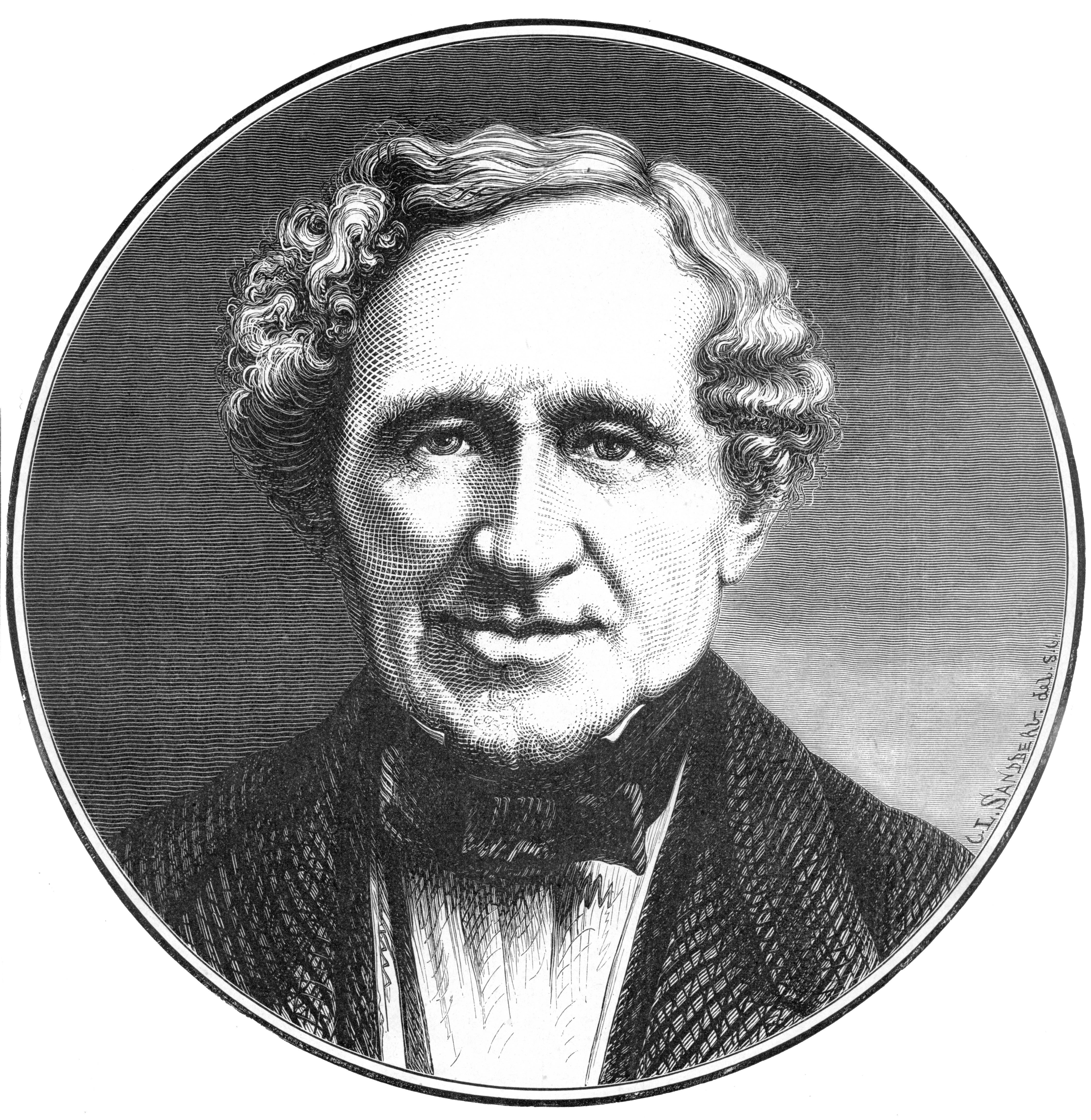 Jacob Letterstedt (1796-1862)